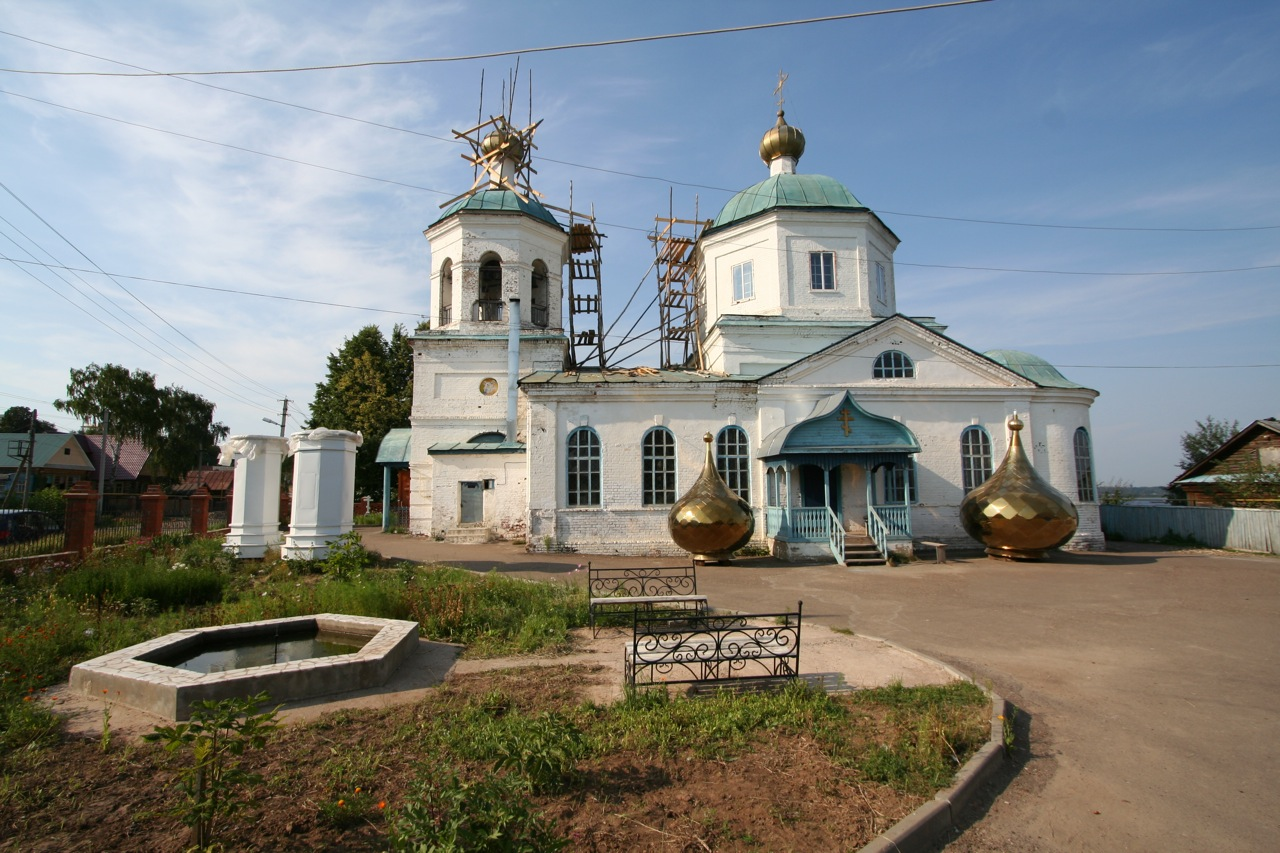 Николо-Ильинская церковь в Верхнем Услоне // Church of St. Nicholas and Elijah in Verkny Uslon, Tatarstan, Russia.